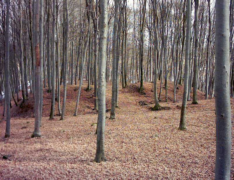 Der Frontwall der Hauptburg.